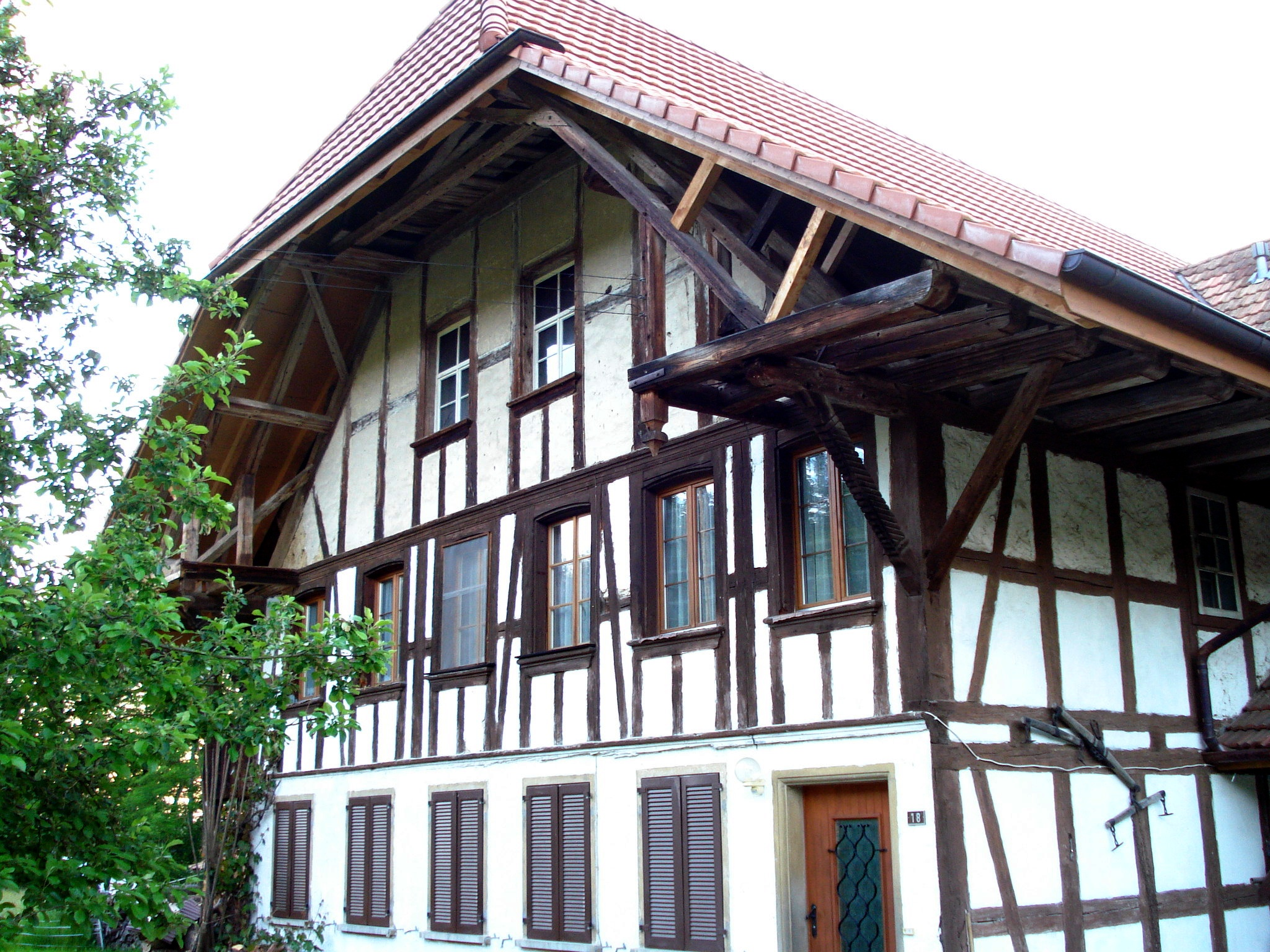 Maison typique d'Argovie